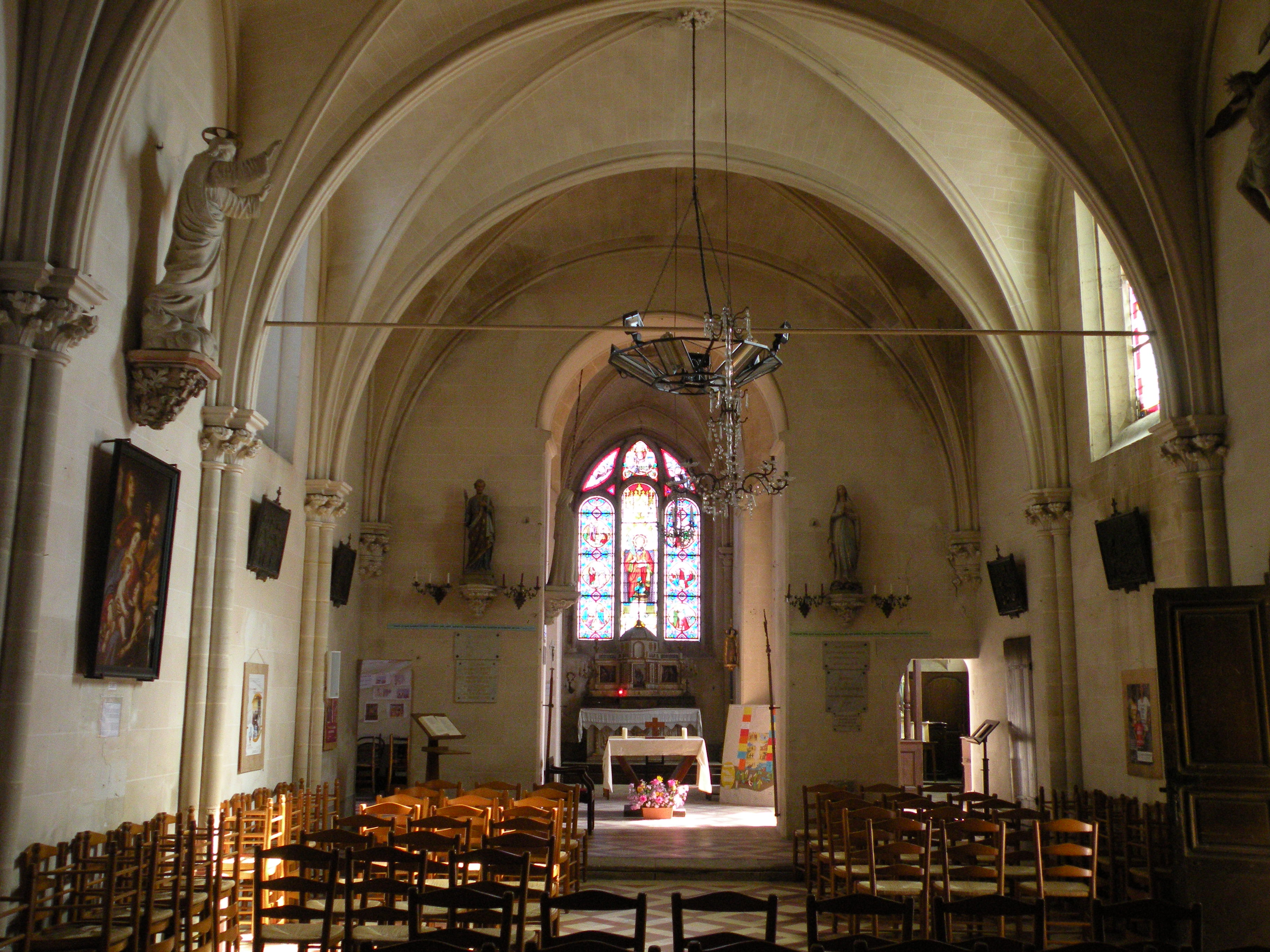 Église Saint-Étienne Bouconvillers